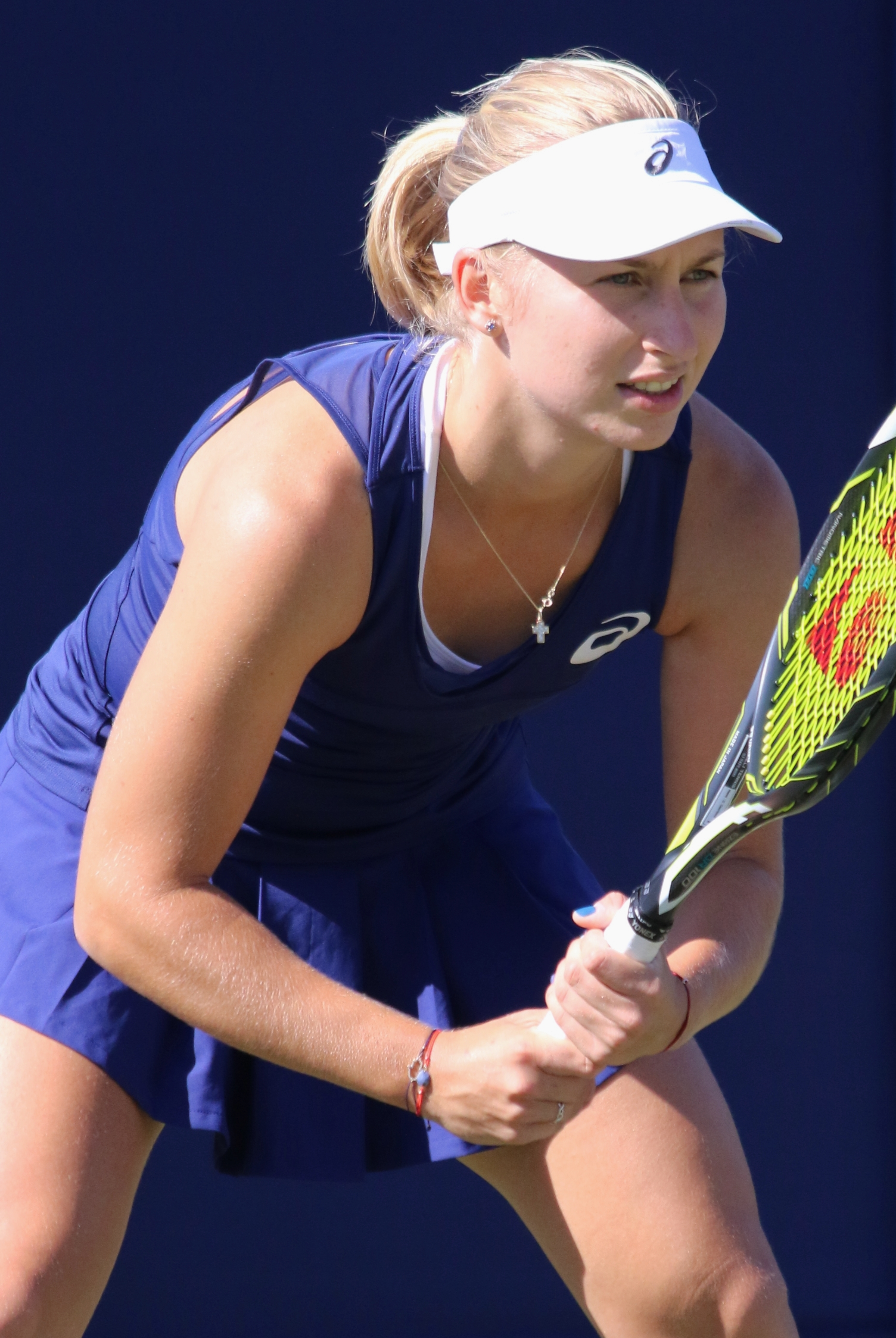 Gavrilova EBN17 (2)